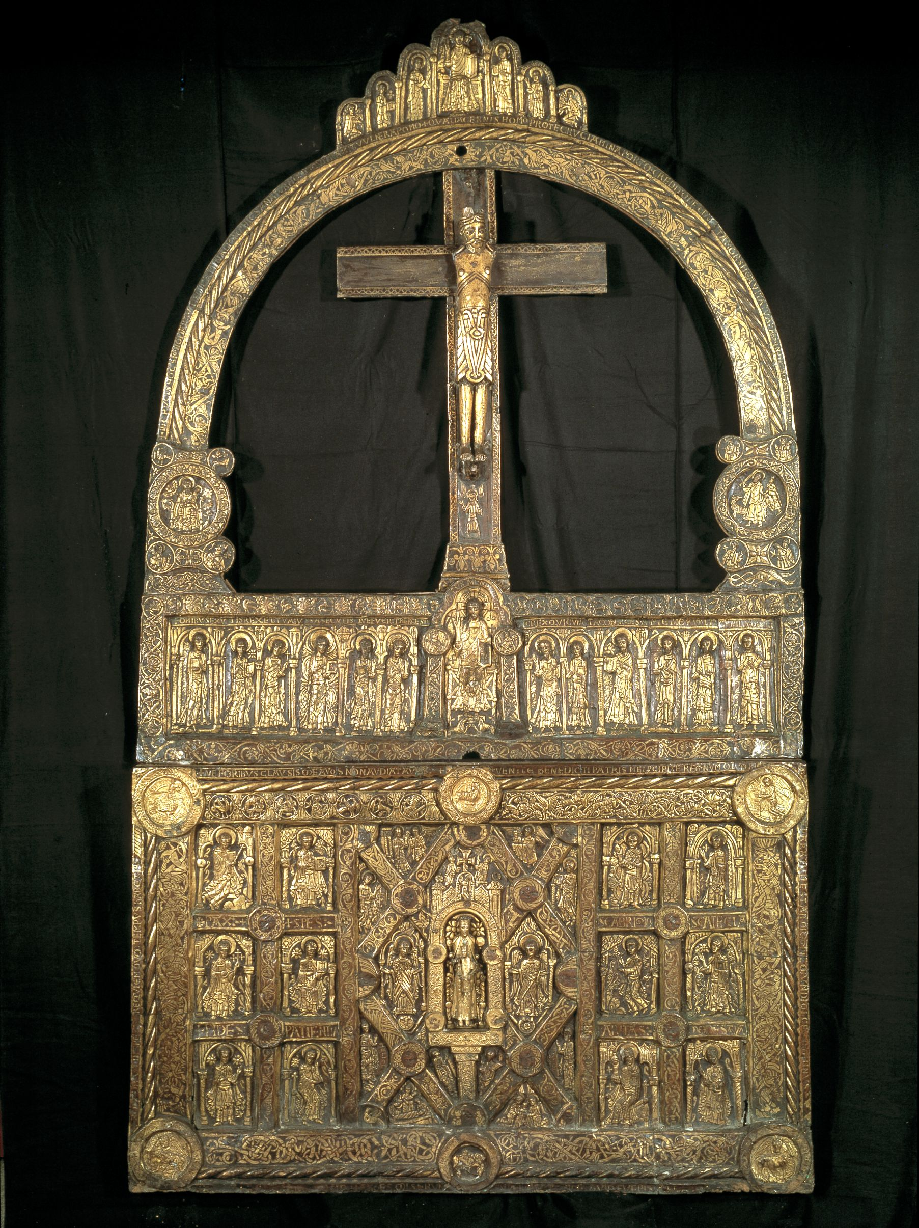 Det gyldne alter fra Lisbjerg Kirke. Dendrokronologisk datering: o. 1135.